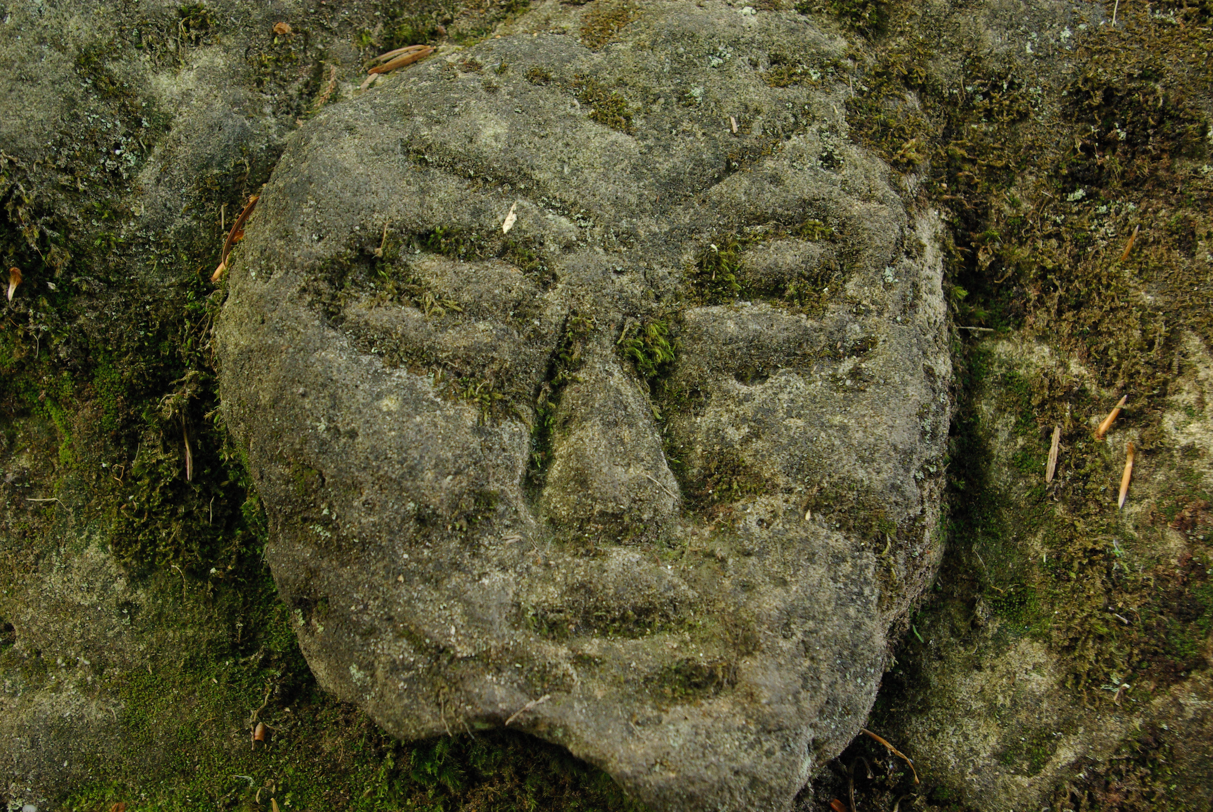 Tête sculptée sur un rocher au sein du vallon de Saint-Martin, Vosges, France.